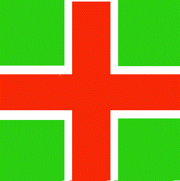 Maurizio Tani, autore, libero uso: Stemma federalista dei volontari che parteciparono alla prima guerra d'indipendenza accanto alle bandiere congiunte piemontesi, toscane, pontificie e napoletane contro l'Austria.